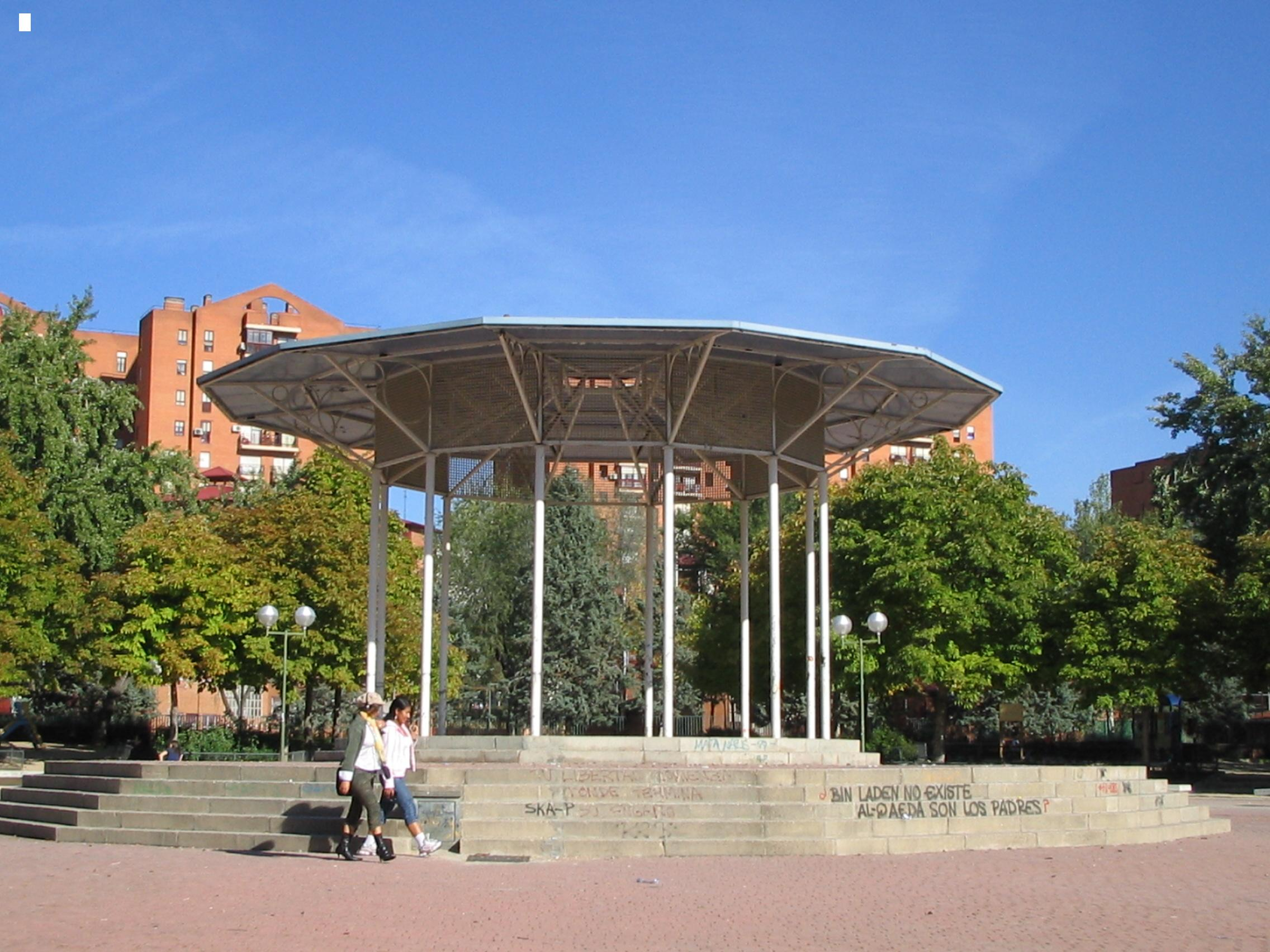 Centro del Parque de la Ciudad de los Ángeles en Madrid